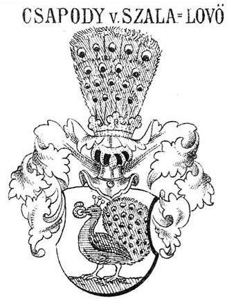 A zalalövői Csapody család cimere